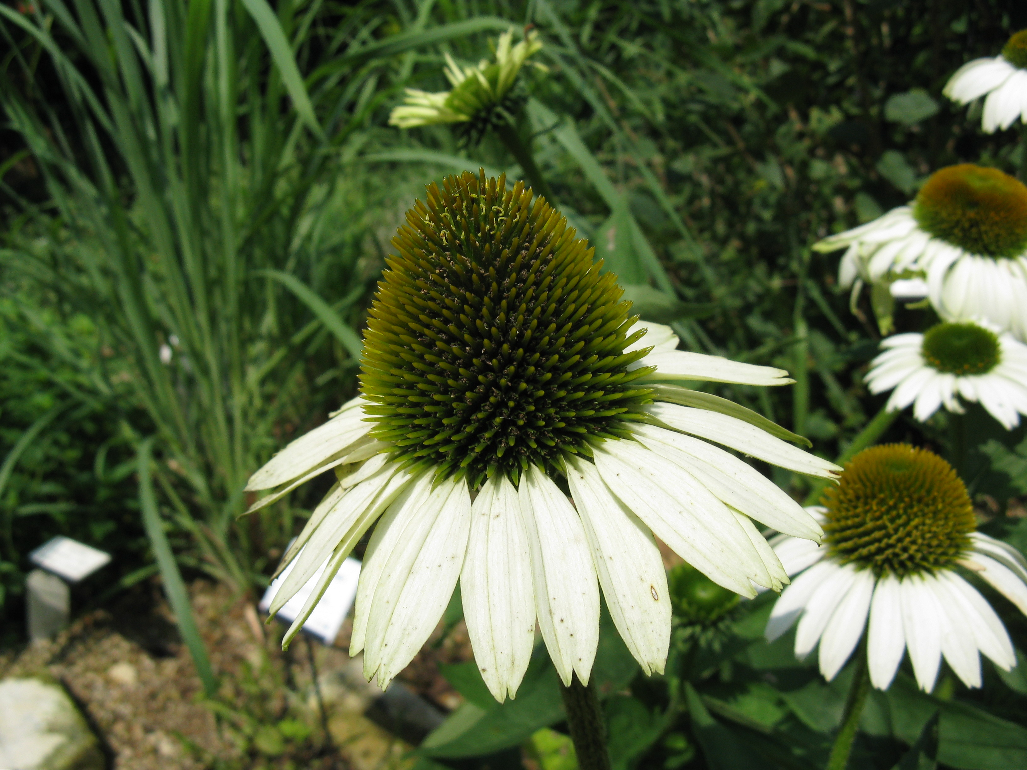 Echinacea purpurea 'Primadonna White'